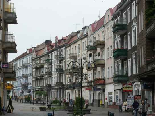 Starówka w Słubicach